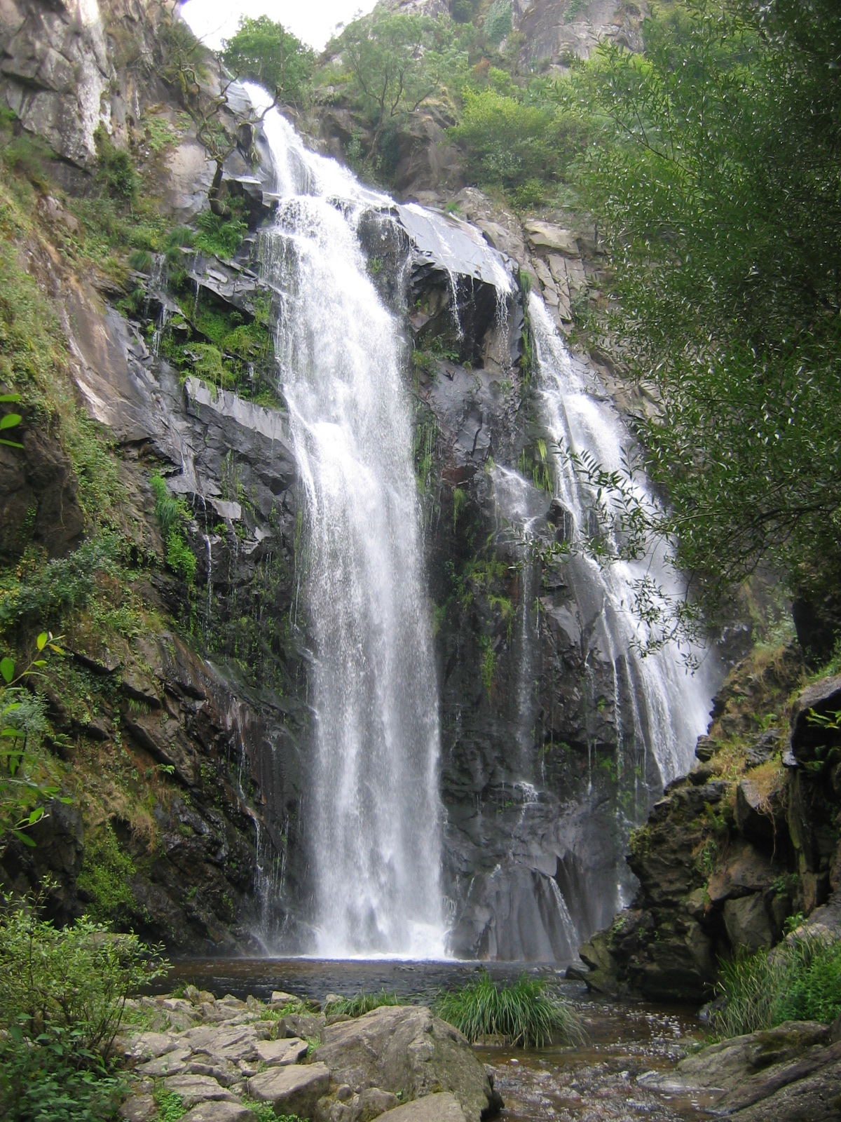 Fervenzas do río Toxa, Silleda